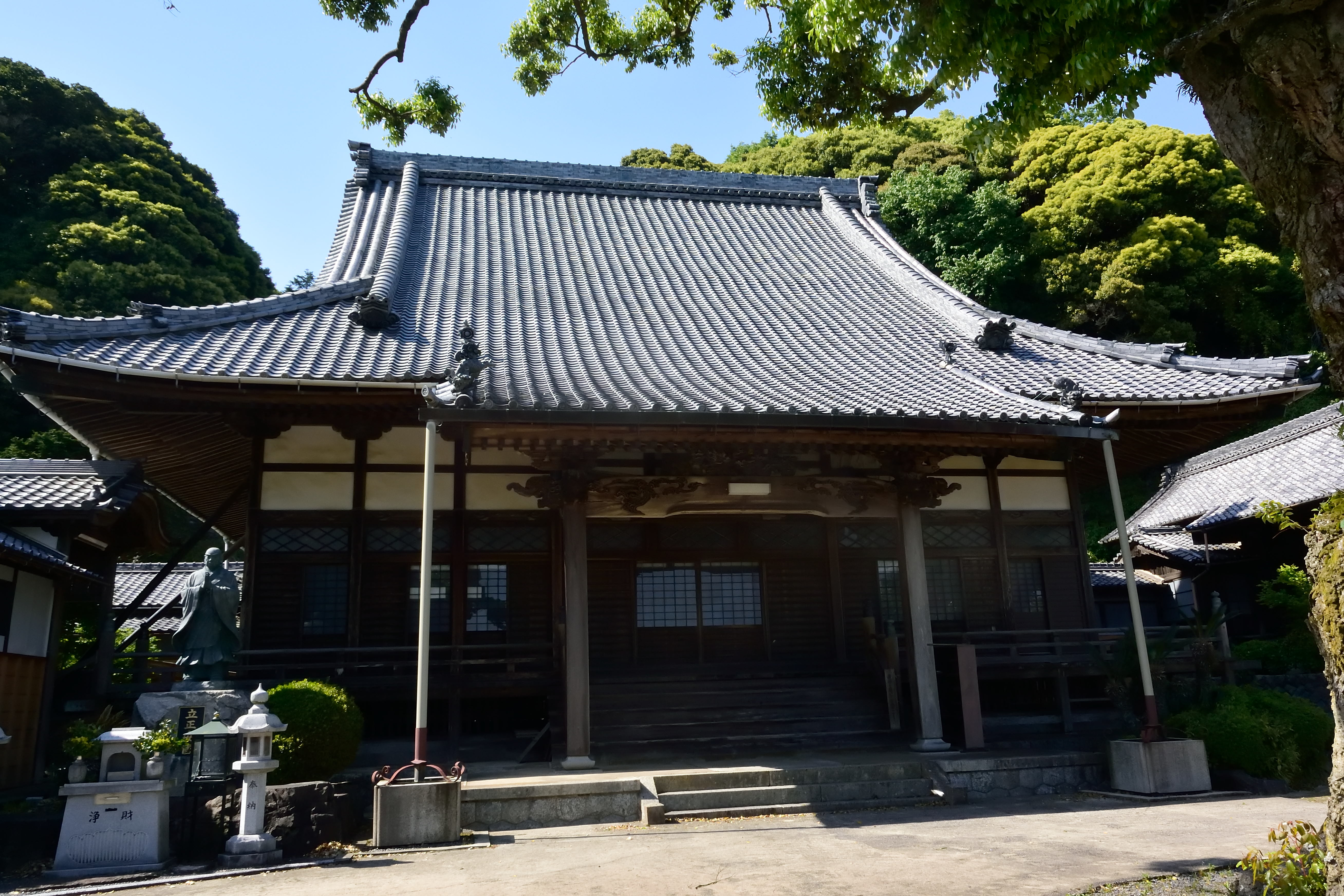 愛知県額田郡幸田町にある長満寺の本堂